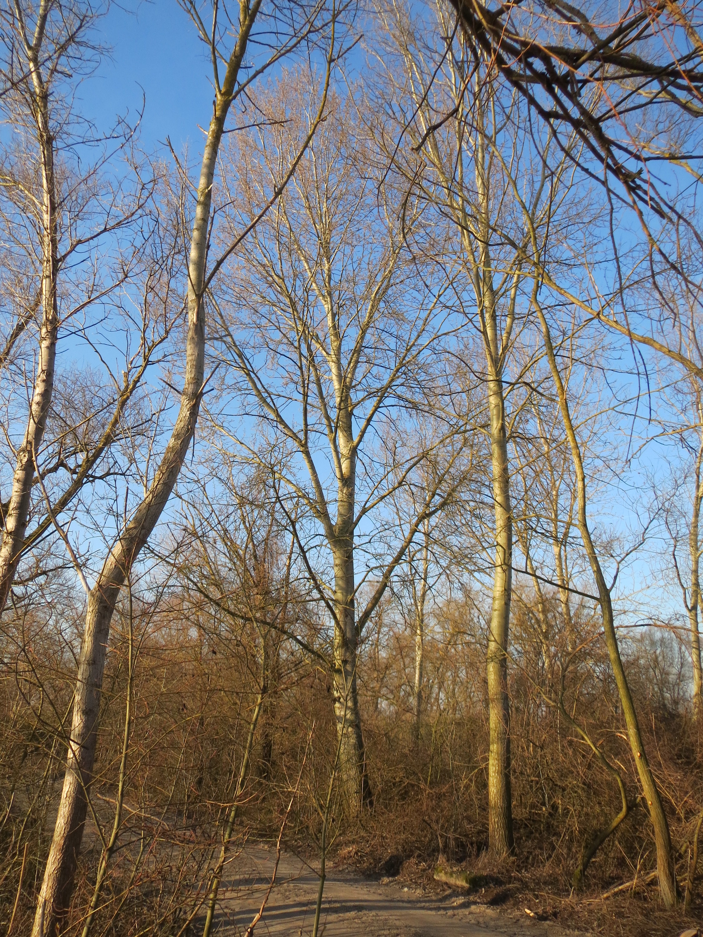 Zitterpappel (Populus tremula) bei Oberhausen-Rheinhausen